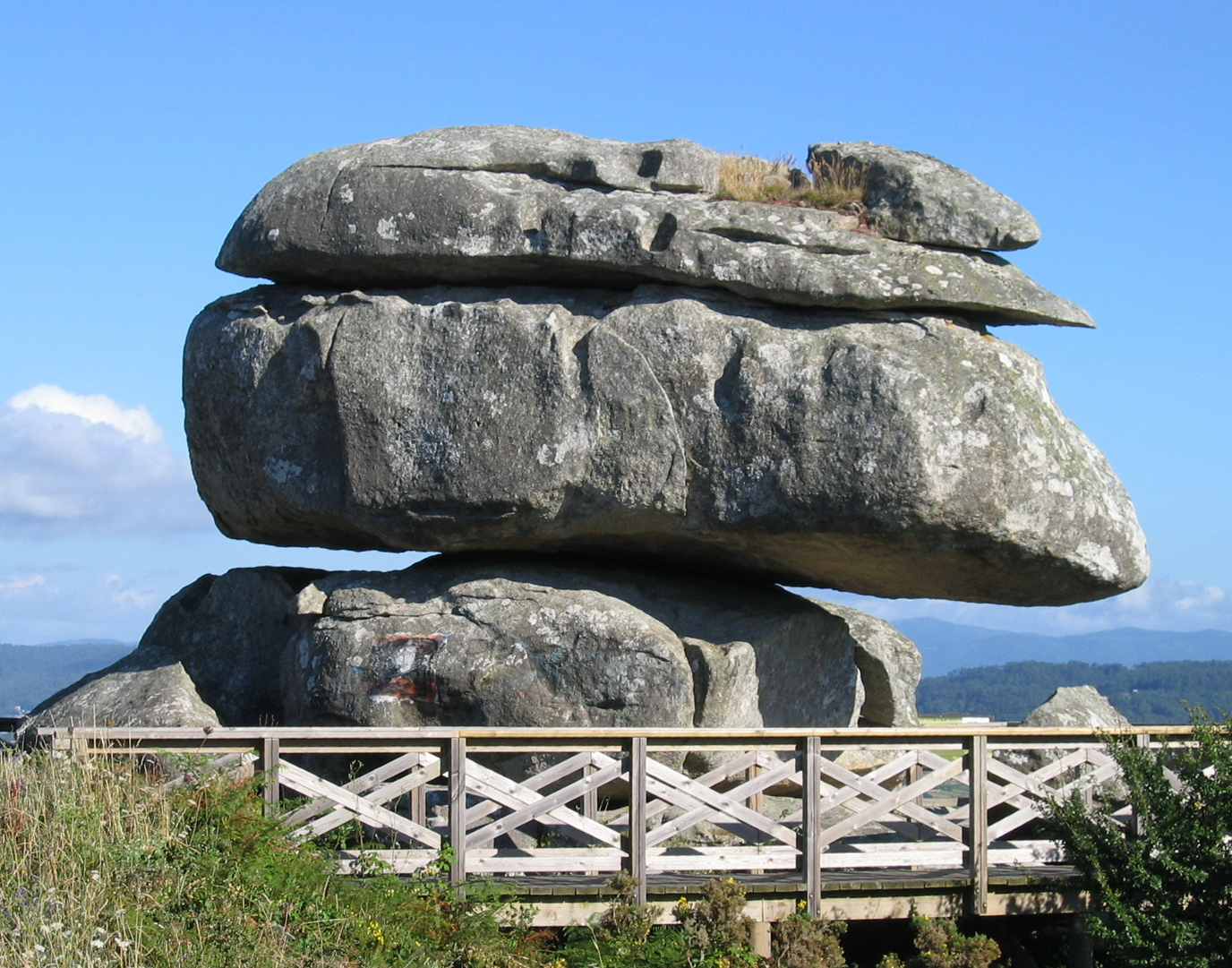 Pedra cabaleira no monte Siradella (O Grove)